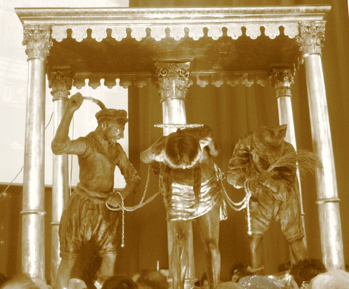 Foto liberamente concessa da G. Caschetto e non protetta da copyright